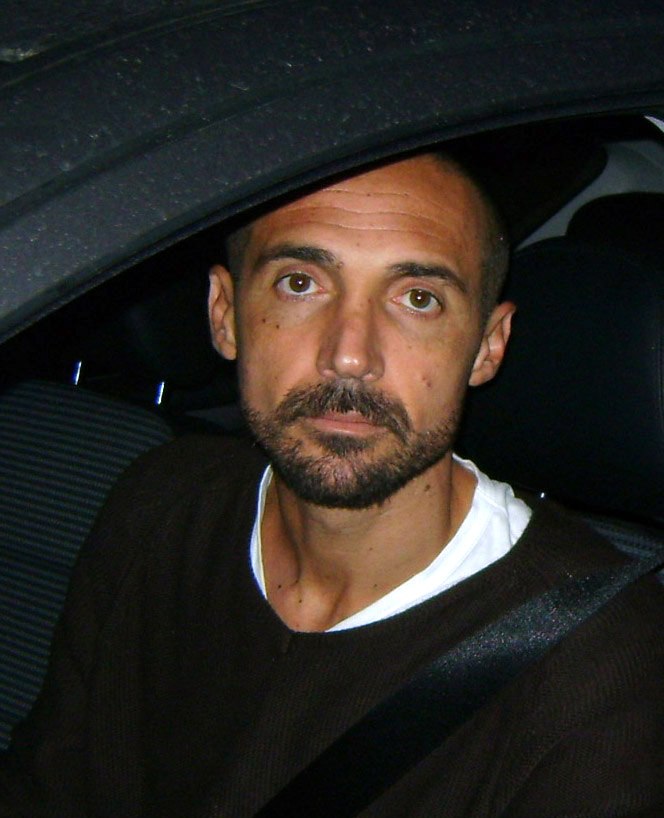 Il calciatore Alberto Fontana